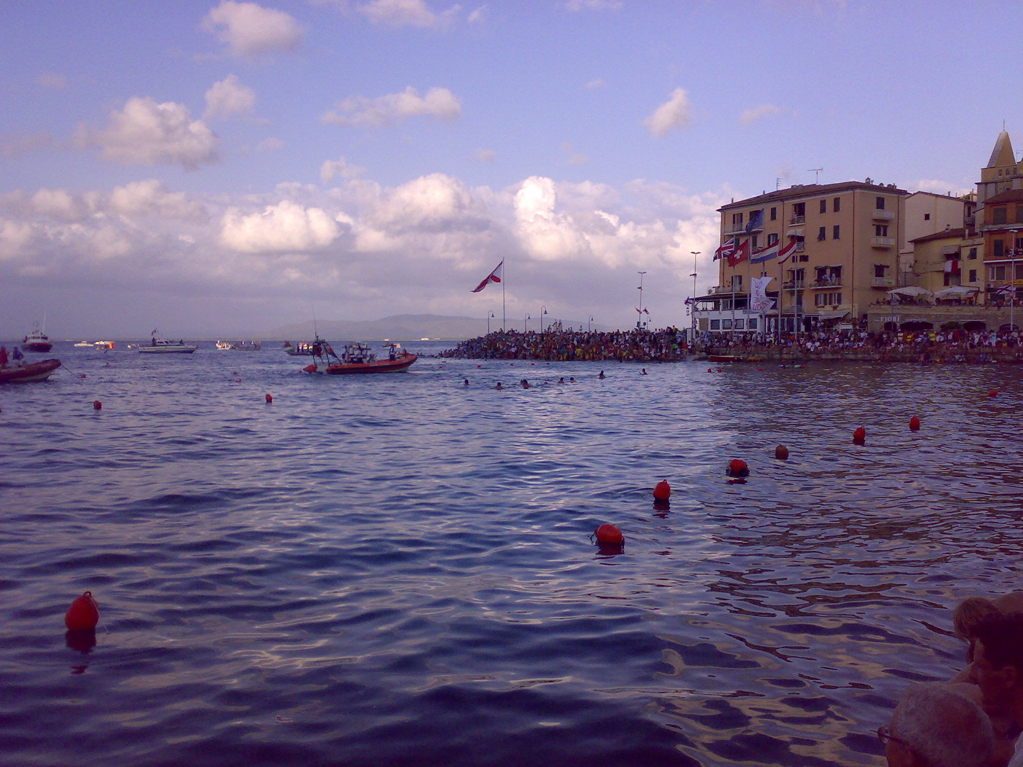 Specchio di mare antistante il porto vecchio di Porto S. Stefano denominato "stadio del turchese" dove viene svolto il palio marinaro dell'Argentario.